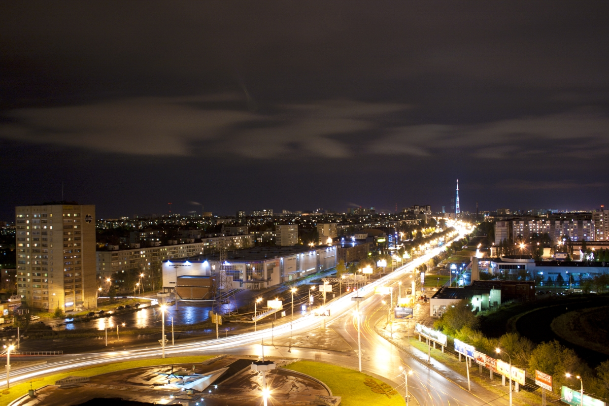 Московское шоссе и проспект Кирова в Самаре